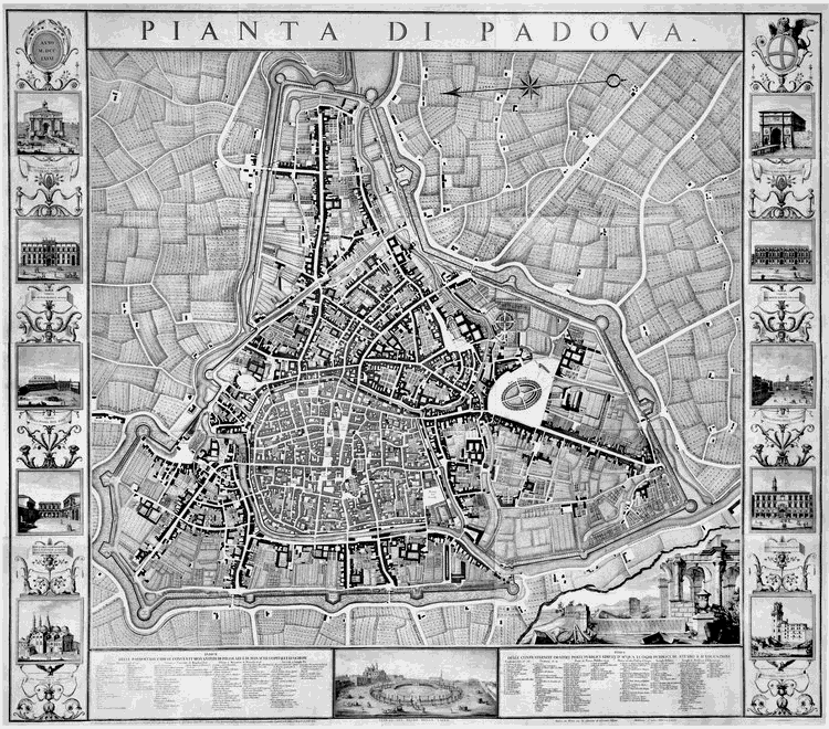 Pianta di Padova – Giovanni Valle, anno: 1779~1784.